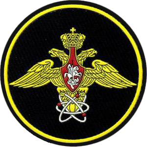 Нарукавный знак 12 Главного Упраления Министерстава Обороны